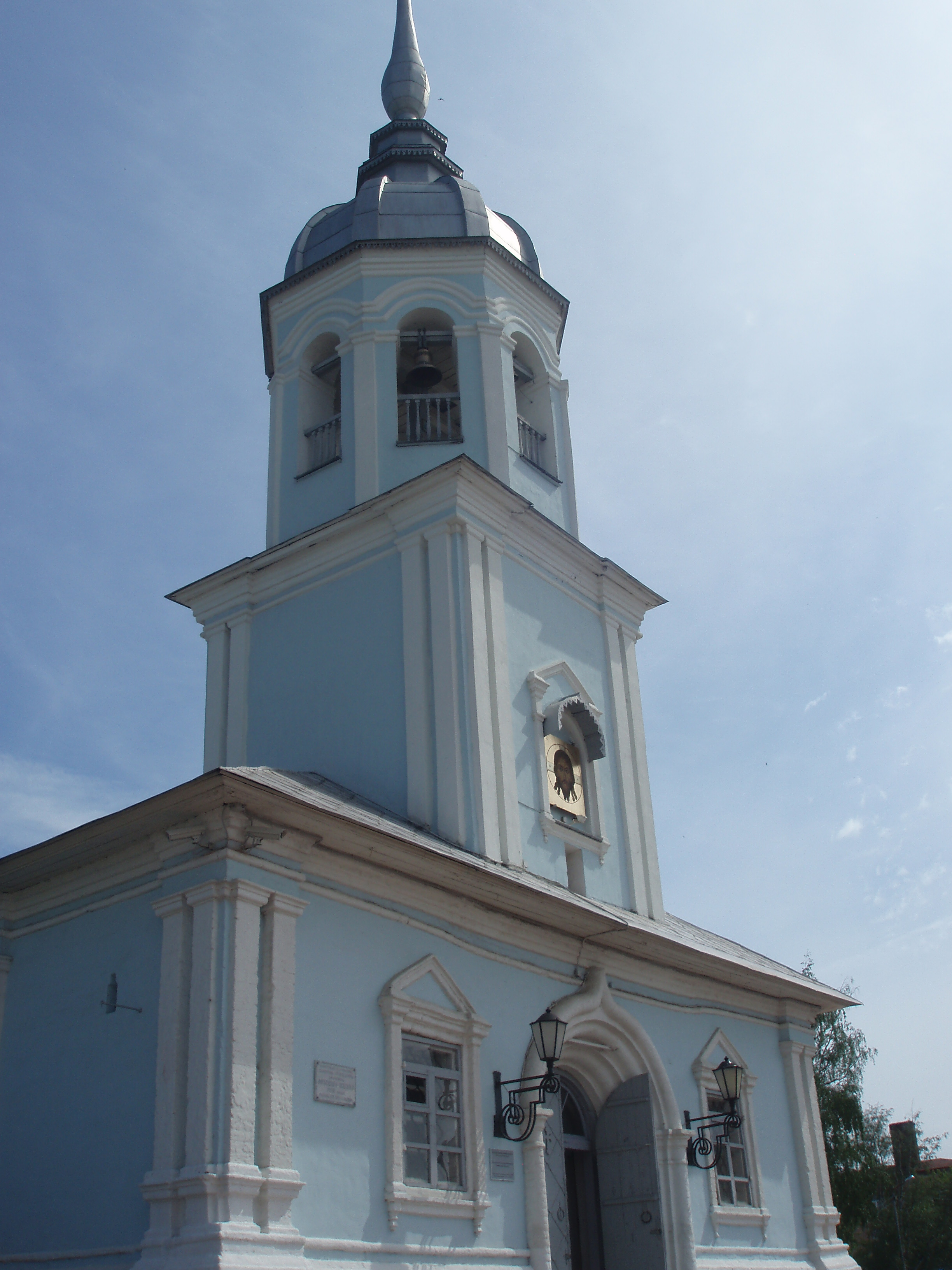 Церковь Александра Невского (Вологодская область, Вологда, С. Орлова улица)